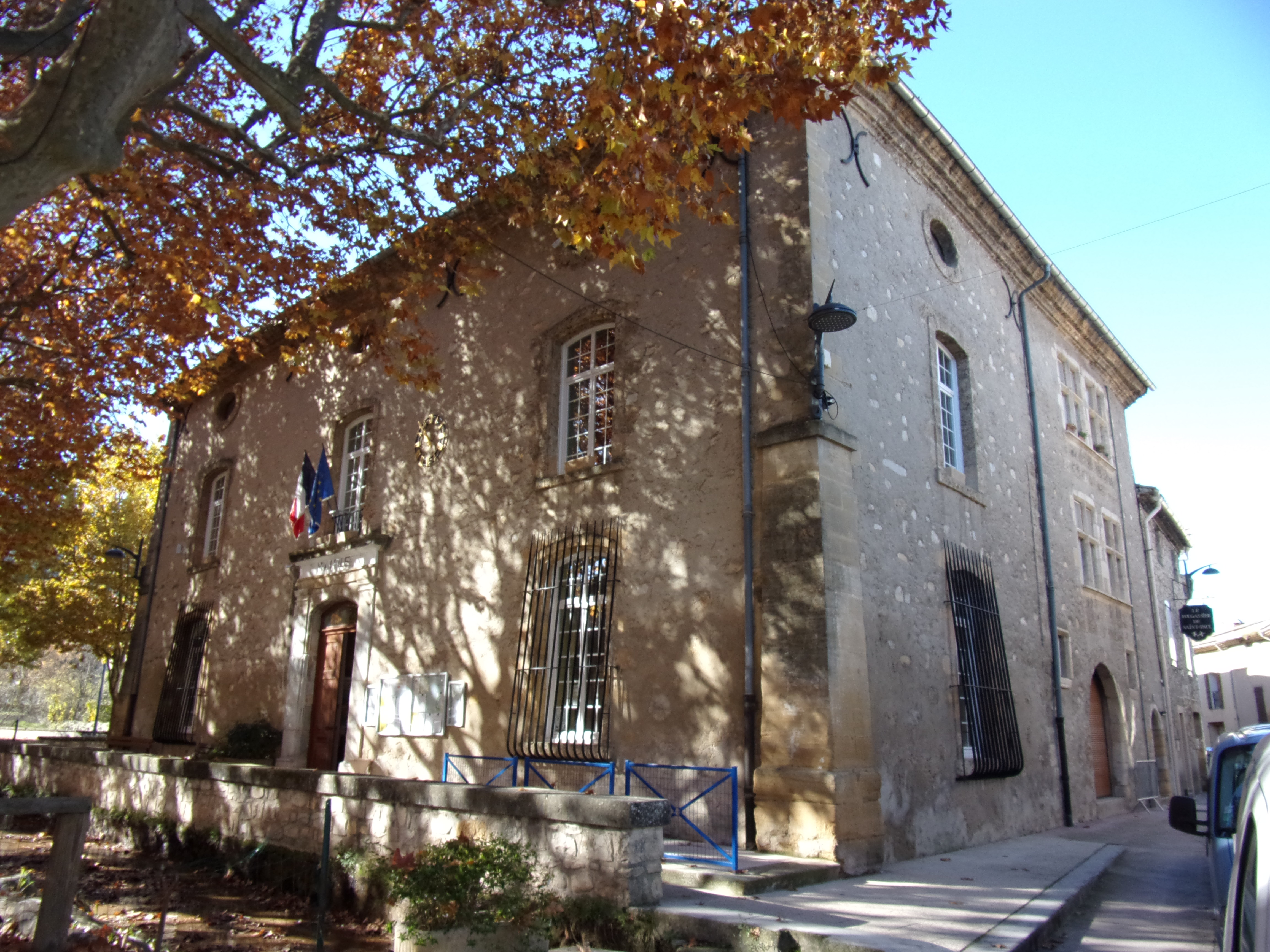 Mairie de Saint-Paul-lès-Durance (Bouches-du-Rhône, France)